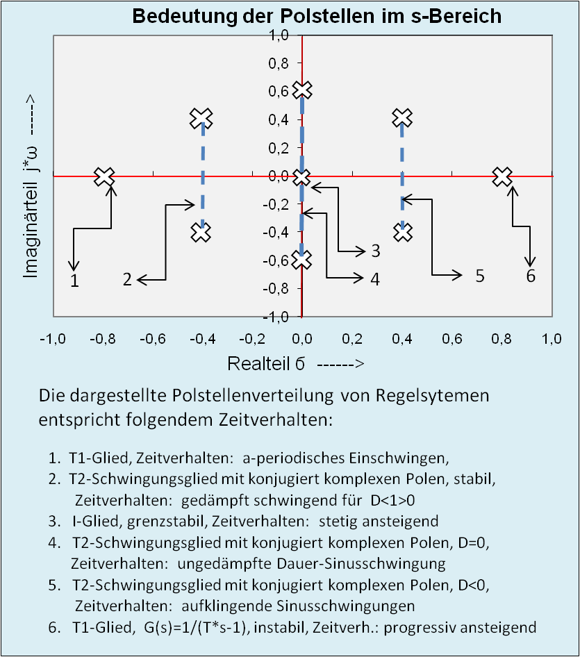 Bedeutung der Polstellen in der s-Ebene